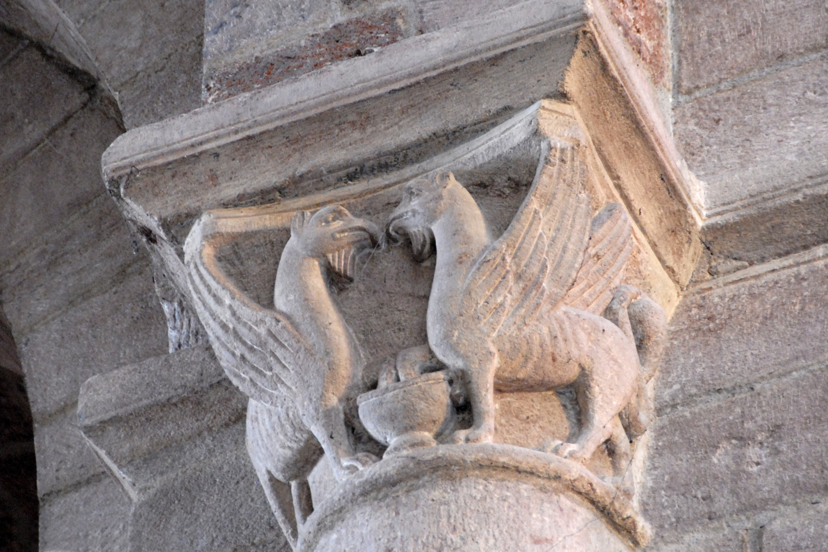 St.-Julien Brioude, Kapitell, 2 vierbeinige Greifen am Kelch